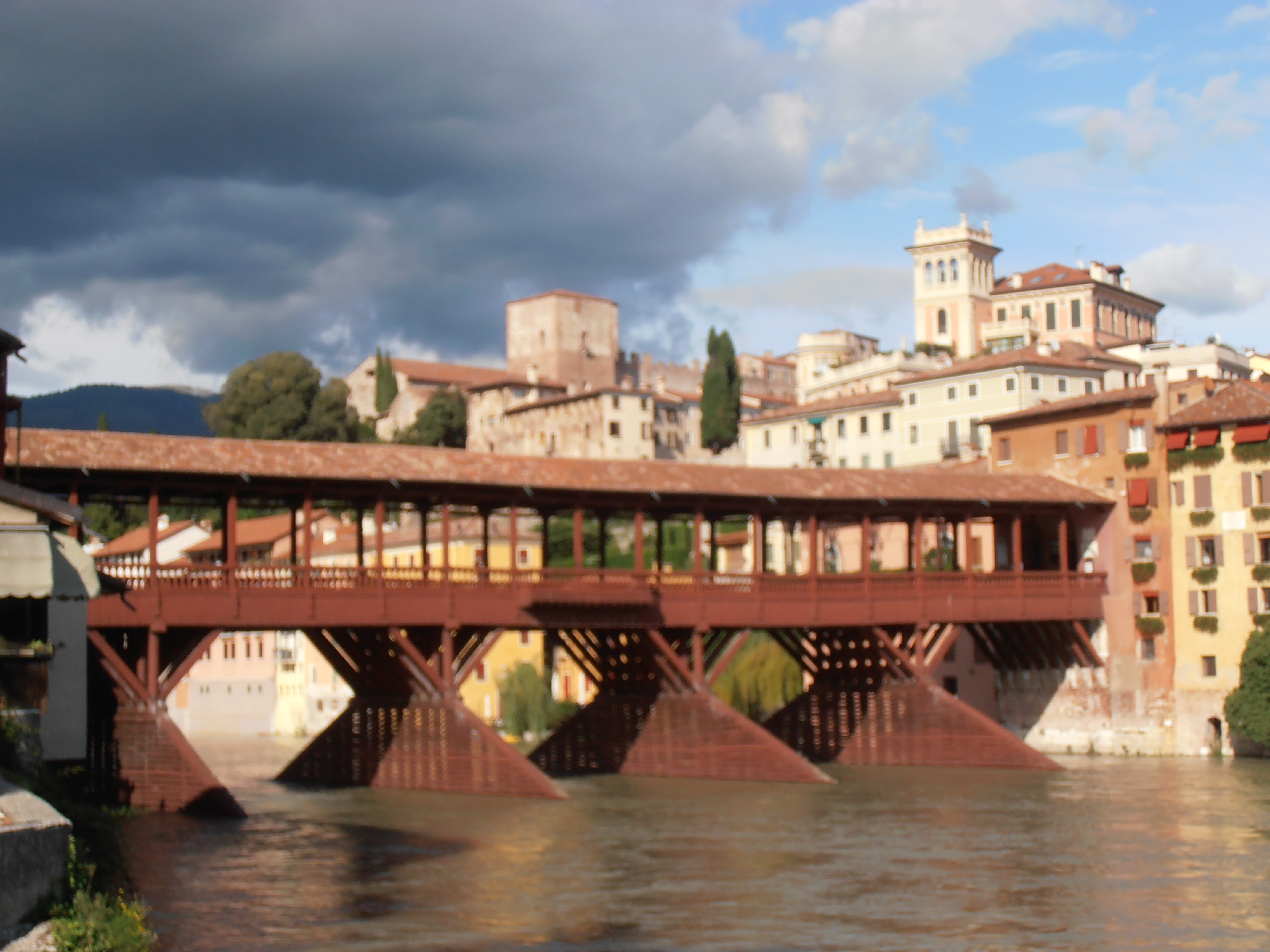 Italie-Bassano del Grappa, Ponte Vecchio